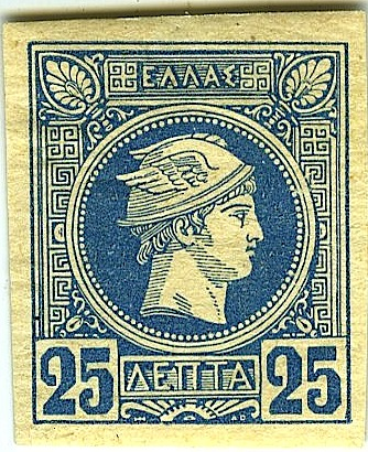 SHH - Tirage de Malines - 25 Lepta